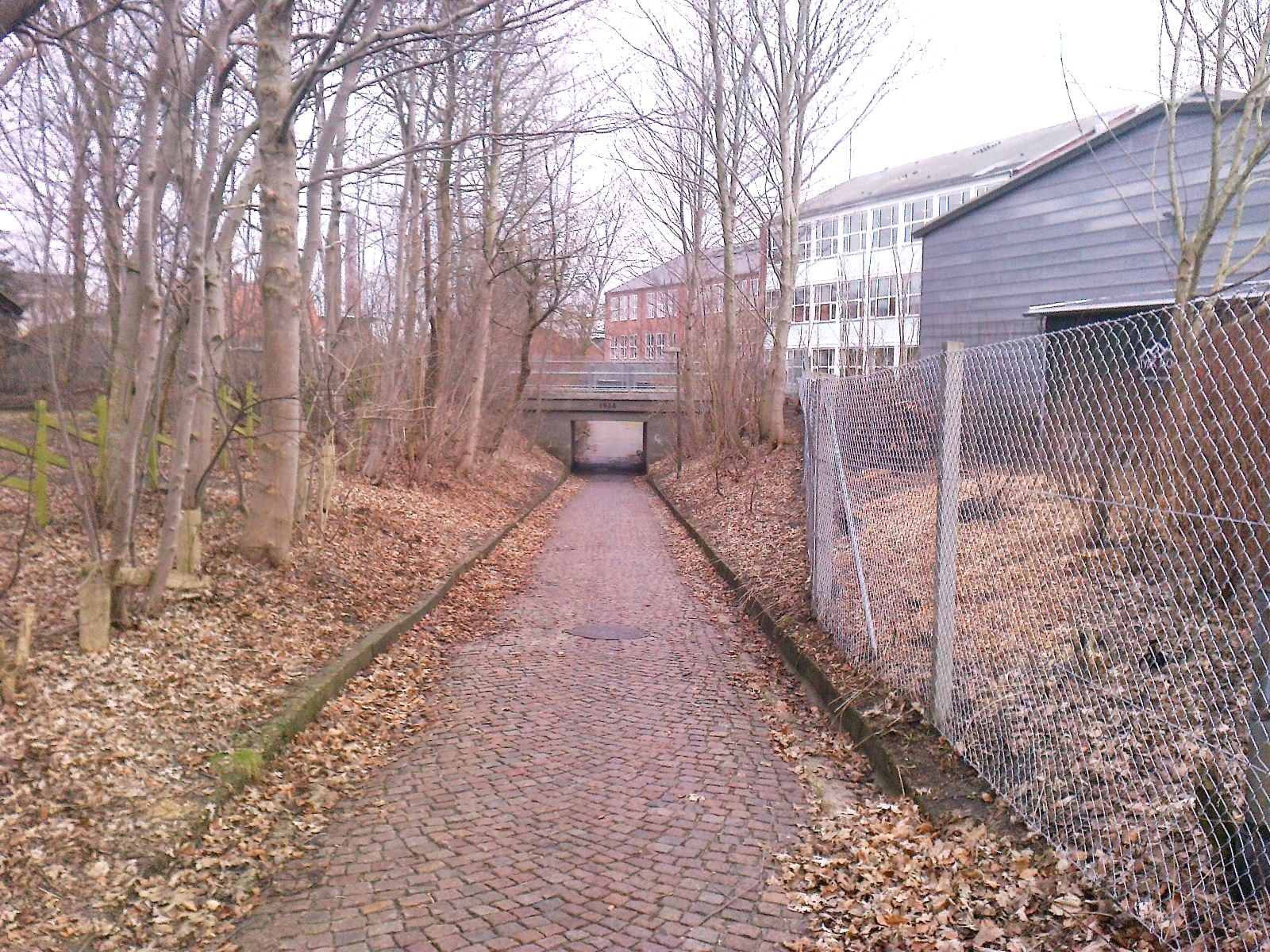 Stien fra Holstebro Sydbanegård til Sønderport billetsalgssted